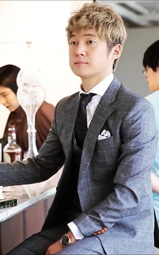 宋昶儀拍攝Sceneplaybill 2014年7月號專訪照片